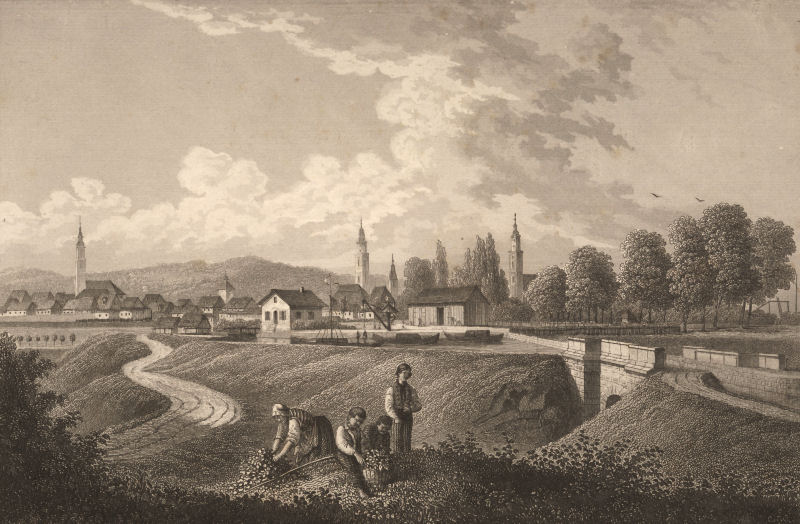 Der Kanalhafen von Erlangen. Stahlstich von Alexander Marx aus dem Buch Pittoreske Ansichten des Ludwig-Donau-Main-Kanals. Gezeichnet, auf Stahl gestochen und herausgegeben von Alexander Marx. 1845. Kupferstecher in Nürnberg.